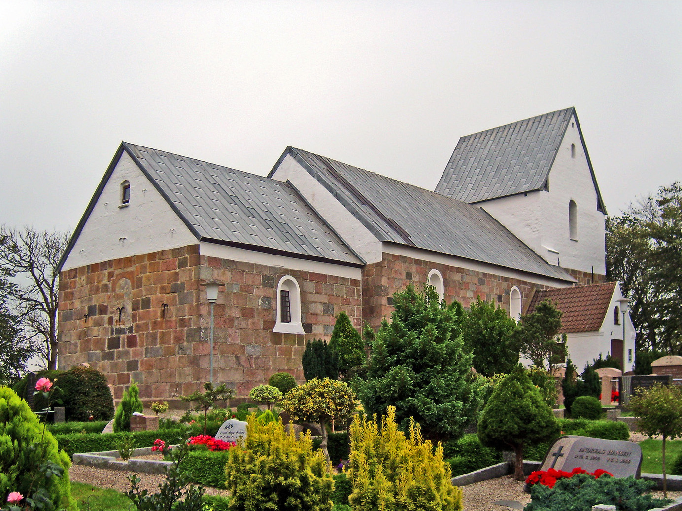 fra nordøst